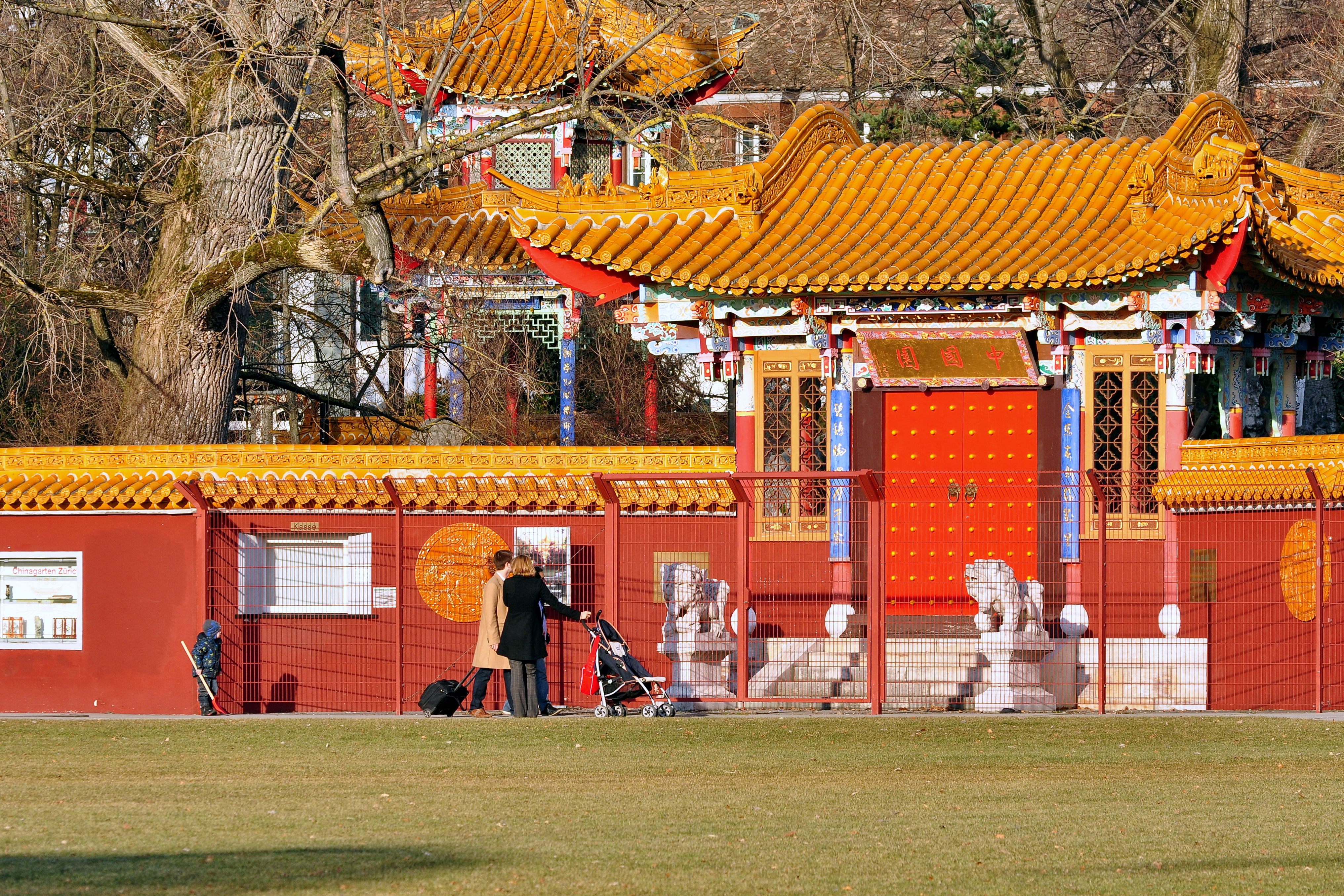 Chinagarten in Zürich-Seefeld (Switzerland)